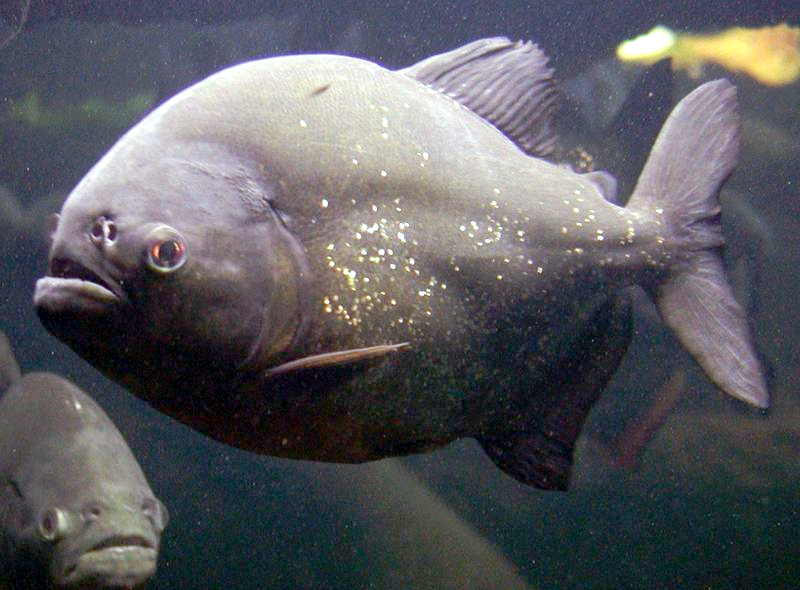 Piranhas (Nahaufnahme / close-up)